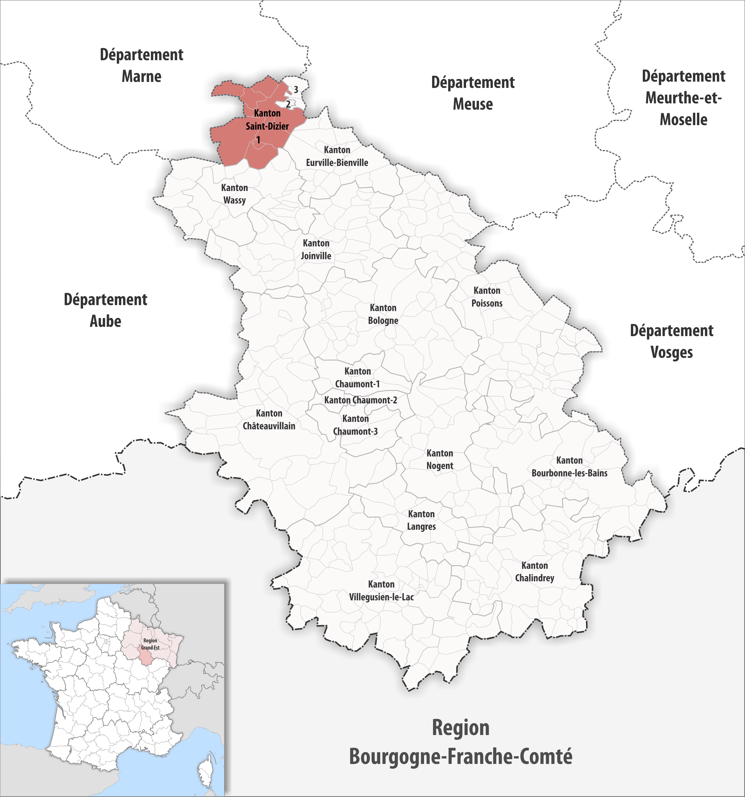 Lage des Kantons Saint-Dizier-1